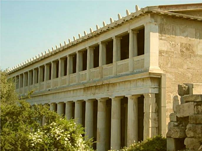 Foto Sofie Debognies april 2005